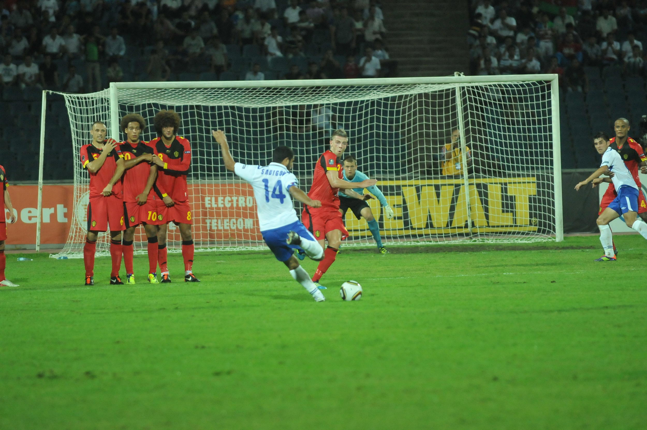 Azərbaycan-Belçika oyunu